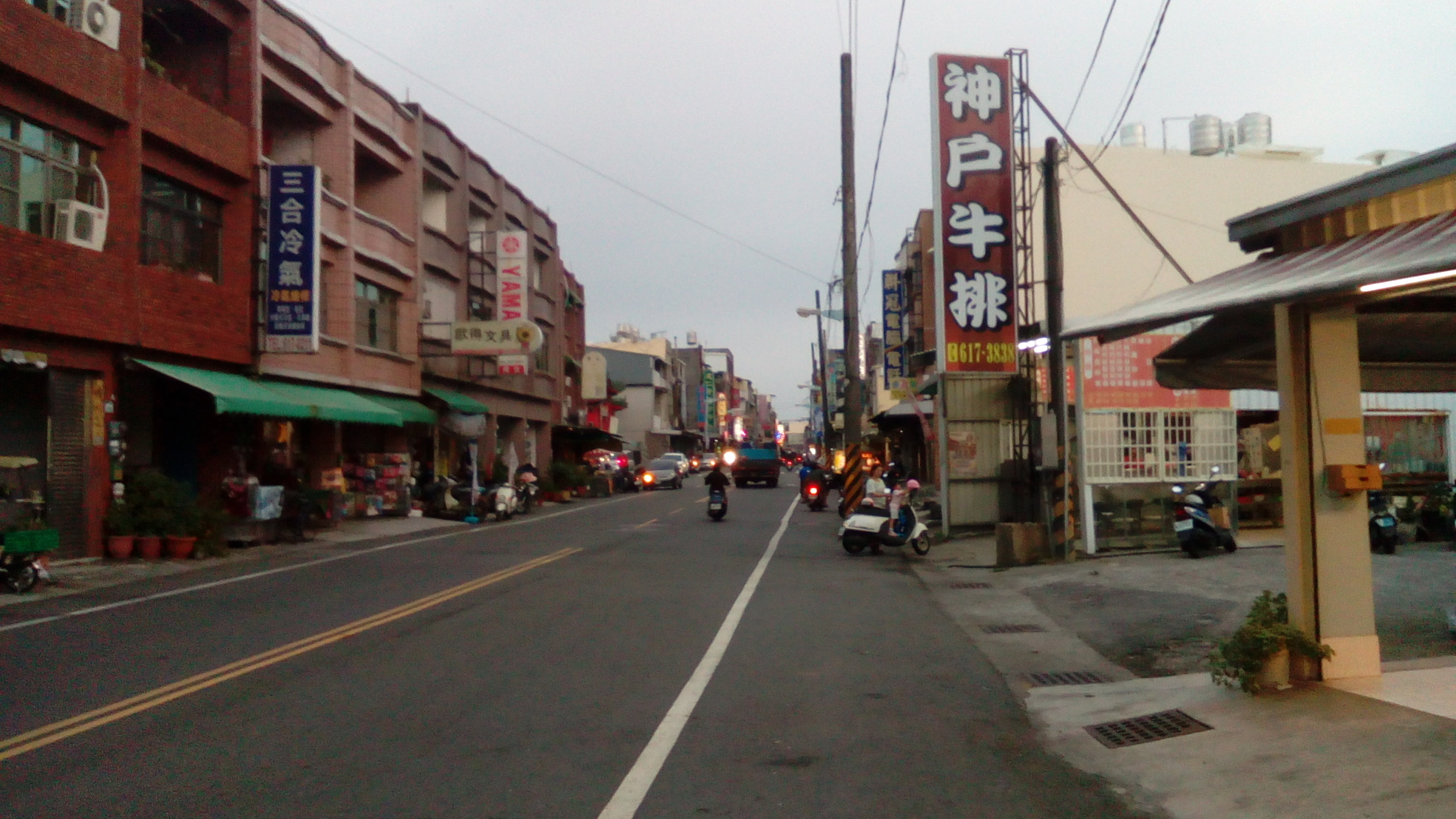 彌陀市區